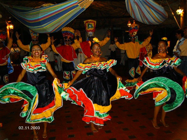 Una demostración de un baile típico en Cartagena, Colombia